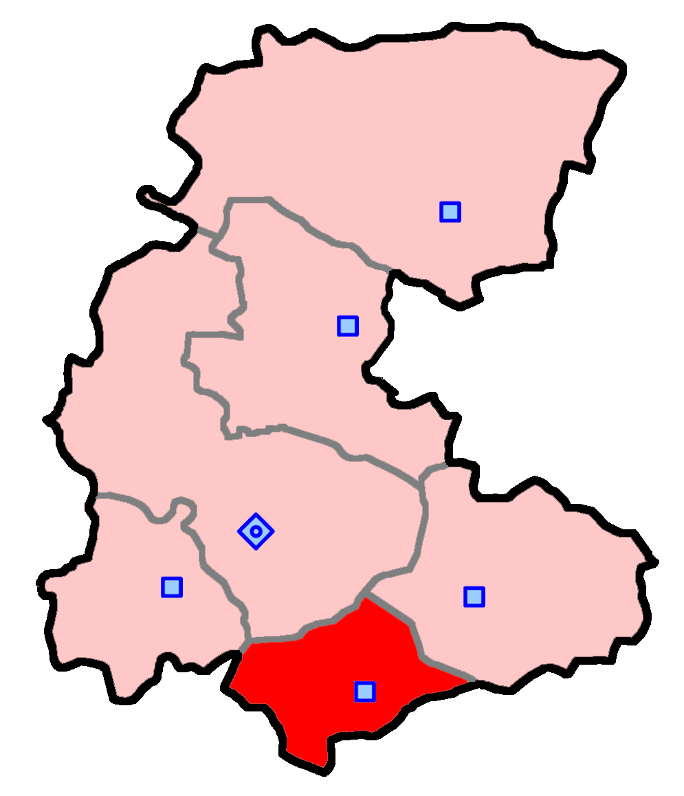 حوزهٔ انتخاباتی خمین برای انتخابات مجلس شورای اسلامی